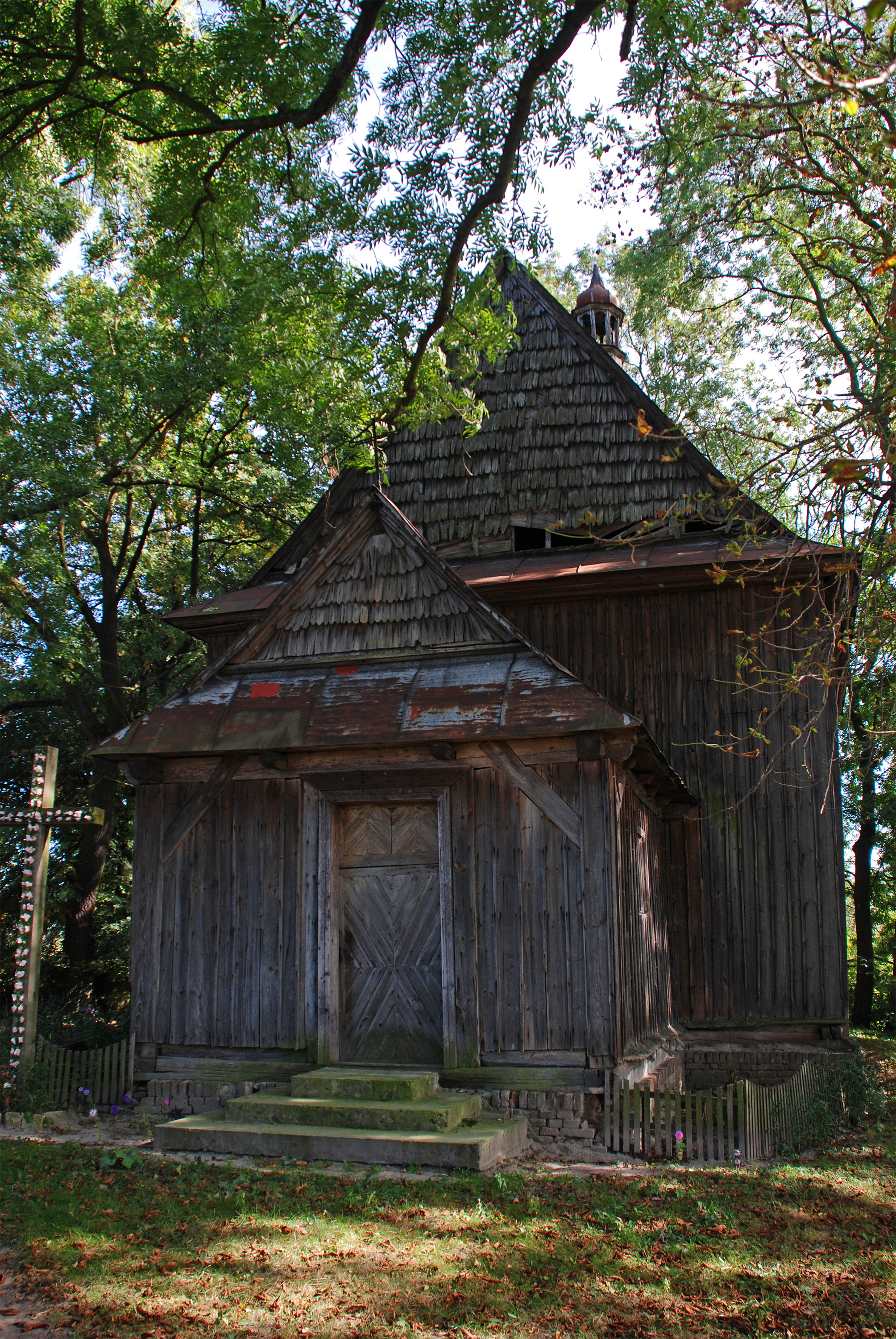 Костел Благовіщення Пресвятої Богородиці (дер.), с.Тадані